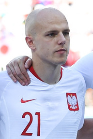 Рафал Кужава (Польша). Япония проиграла Польше, но вышла в плей-офф.